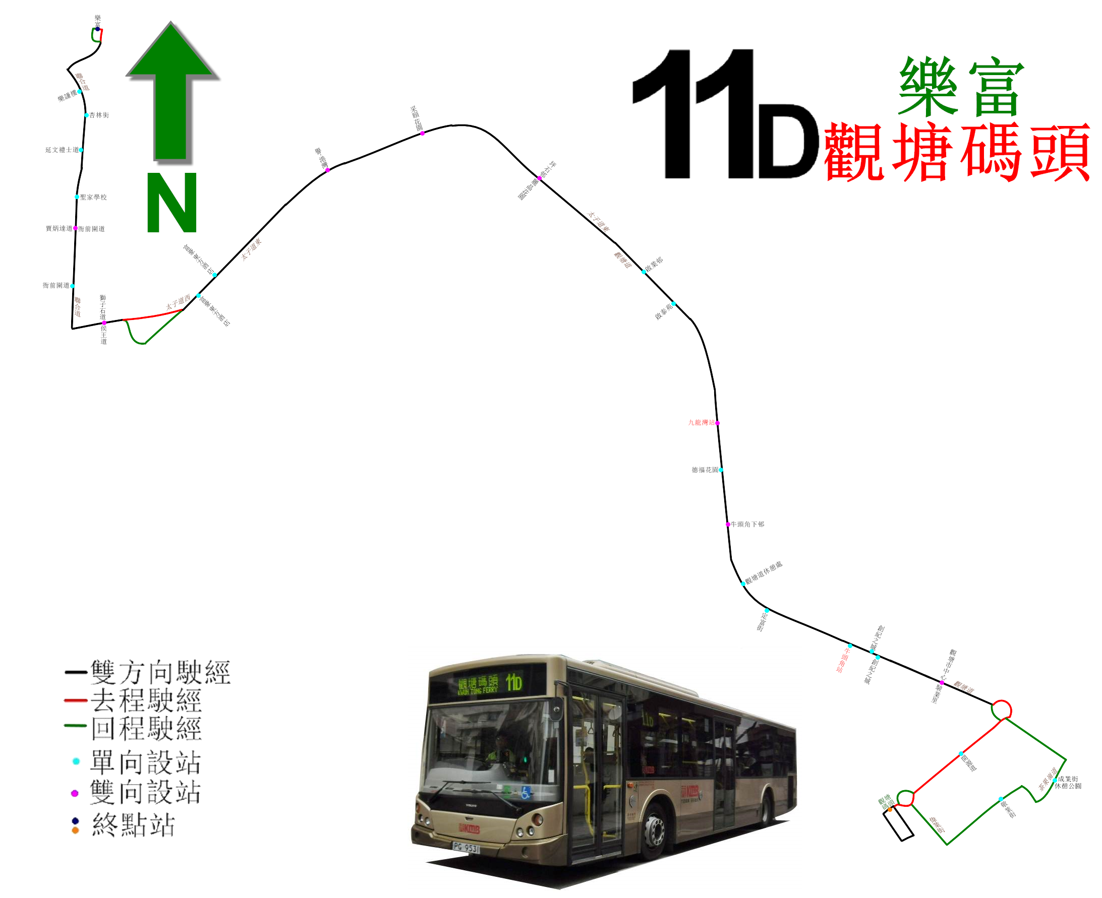 中文（香港）: 九巴11D線的走線圖